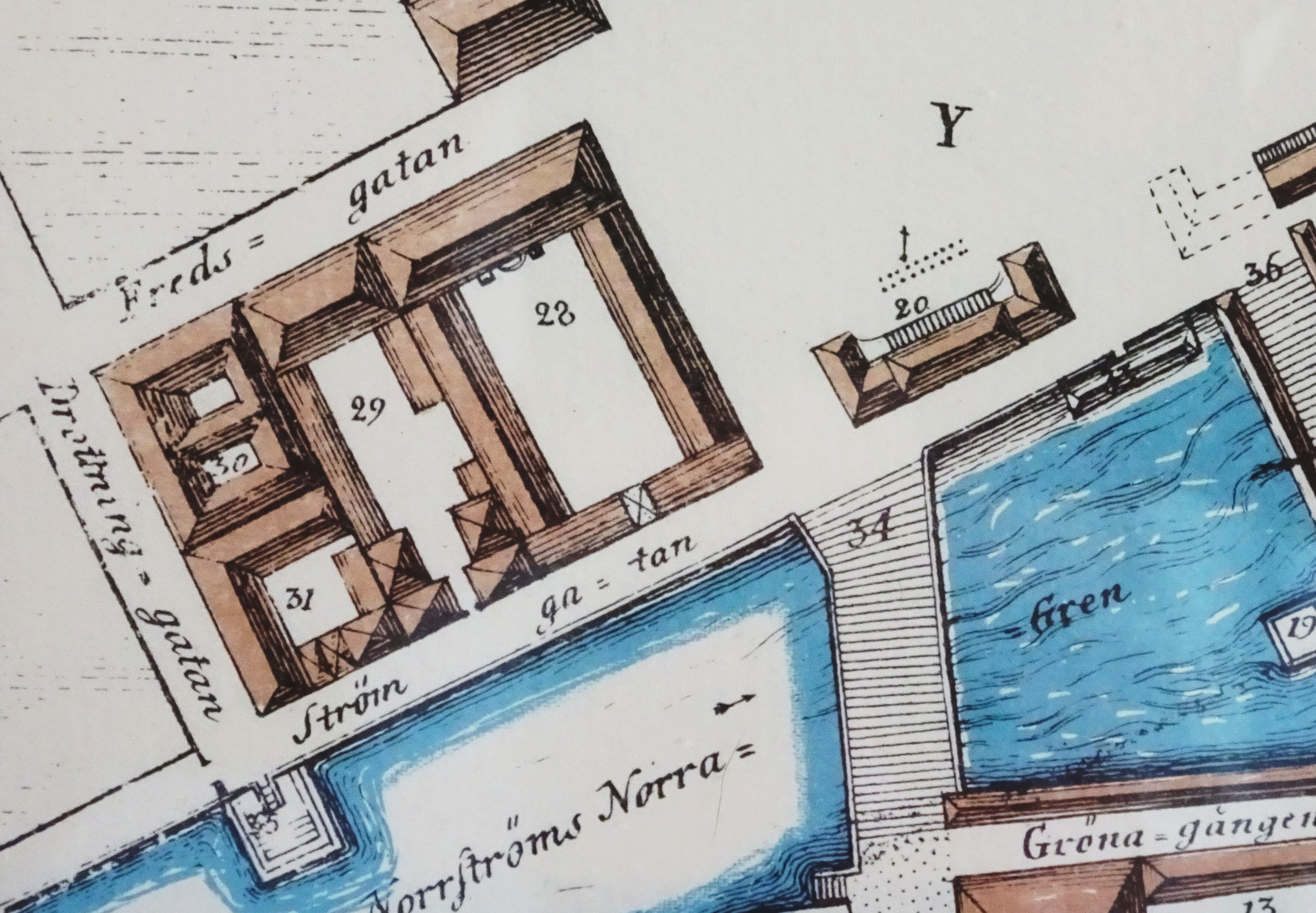 Del av karta över Gamla stan visande kvarteret Lejonet: 28: Grilliska huset 29: Riksrådet Gyllenstiernas hus 30: Norrmalms sockerbruk 31 Lagman Westermans hus